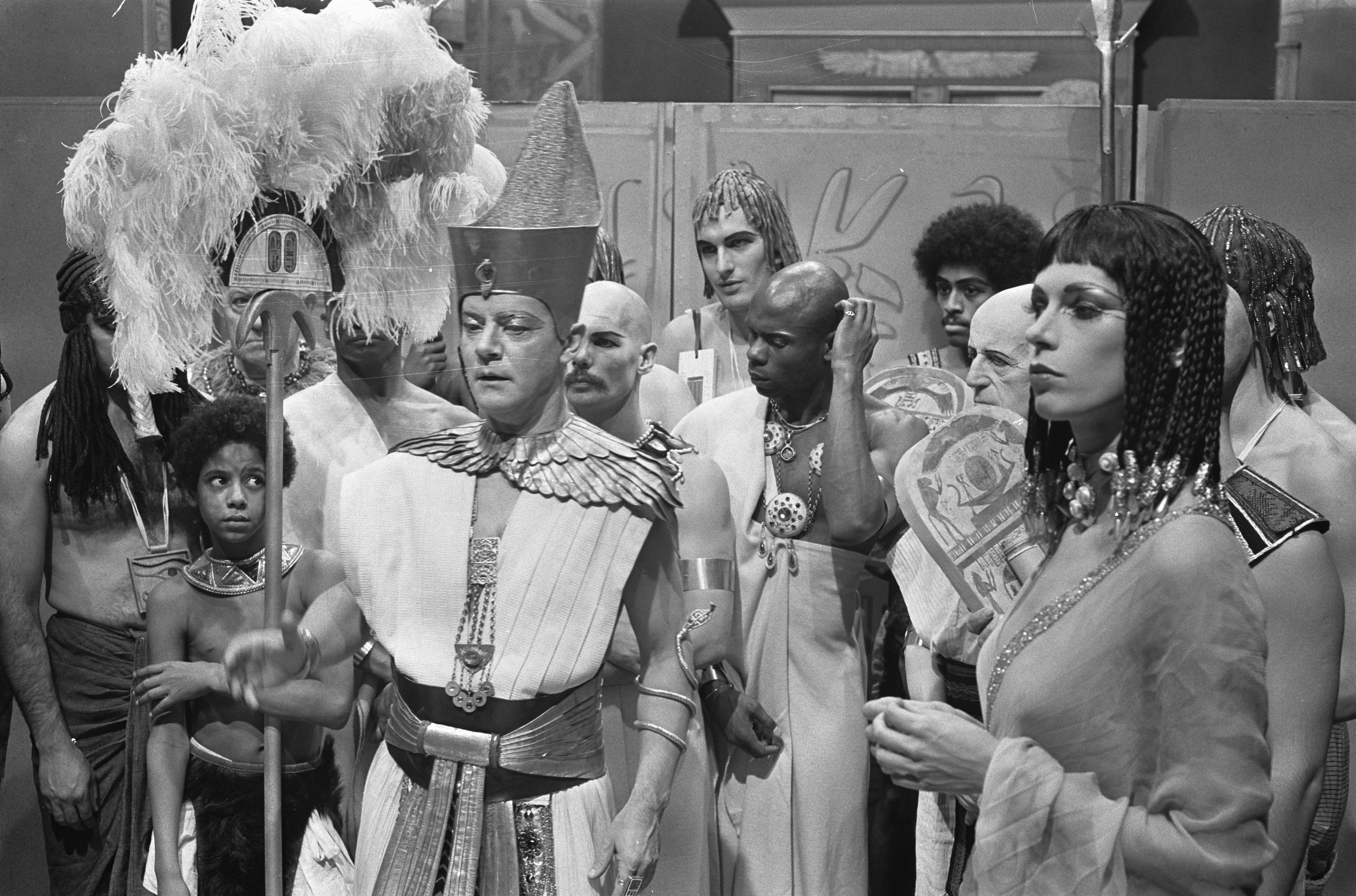 VPRO TV-stuk Ramcinitos en de dief van Herodotes met in hoofdrollen Ton van Duinhoven en Cox Habbema